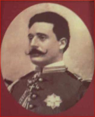 Mariano Carlos Solano y Gálvez, V Marqués de Monsalud.